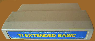 Foto wurde von mir (joho345) am 17.8.2006 fotografiert